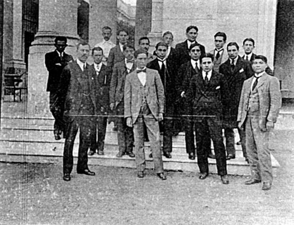 Fotografía de los primeros alumnos de la Universidad Nacional de Tucumán. Año 1914.